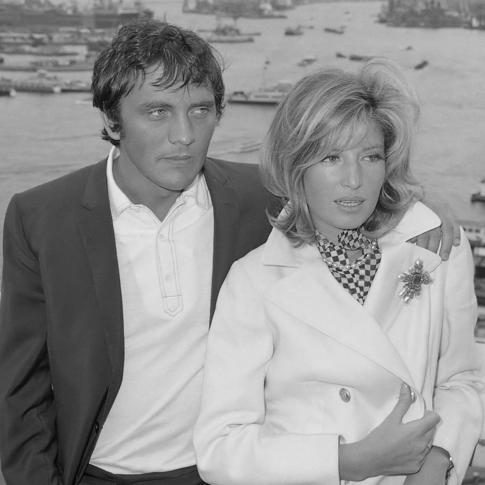 "Modesty Blaise" film van Amerikaan Joseph Losey. Filmopnamen te Amsterdam. Monica Vitti en tegenspeler Terence Stamp 12 juli 1965